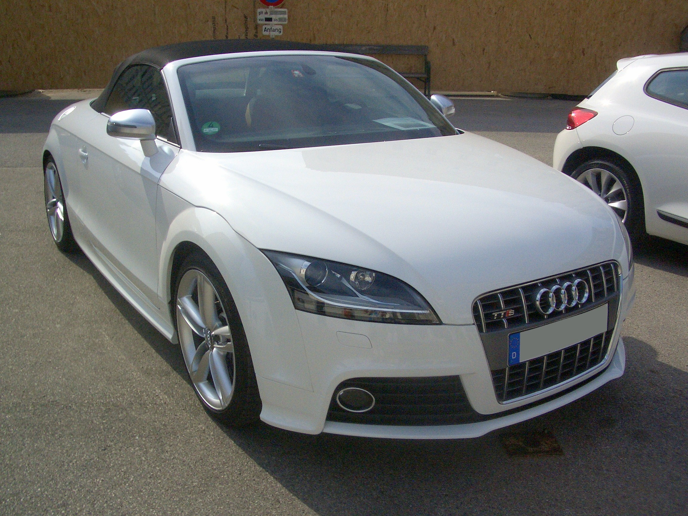 Audi TTS Cabrio